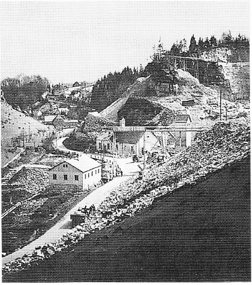 Der Kleinziegenfelder Steinbruch um 1940. Gut zu erkennen ist der damals hohe Industielle Standart des Abbaus